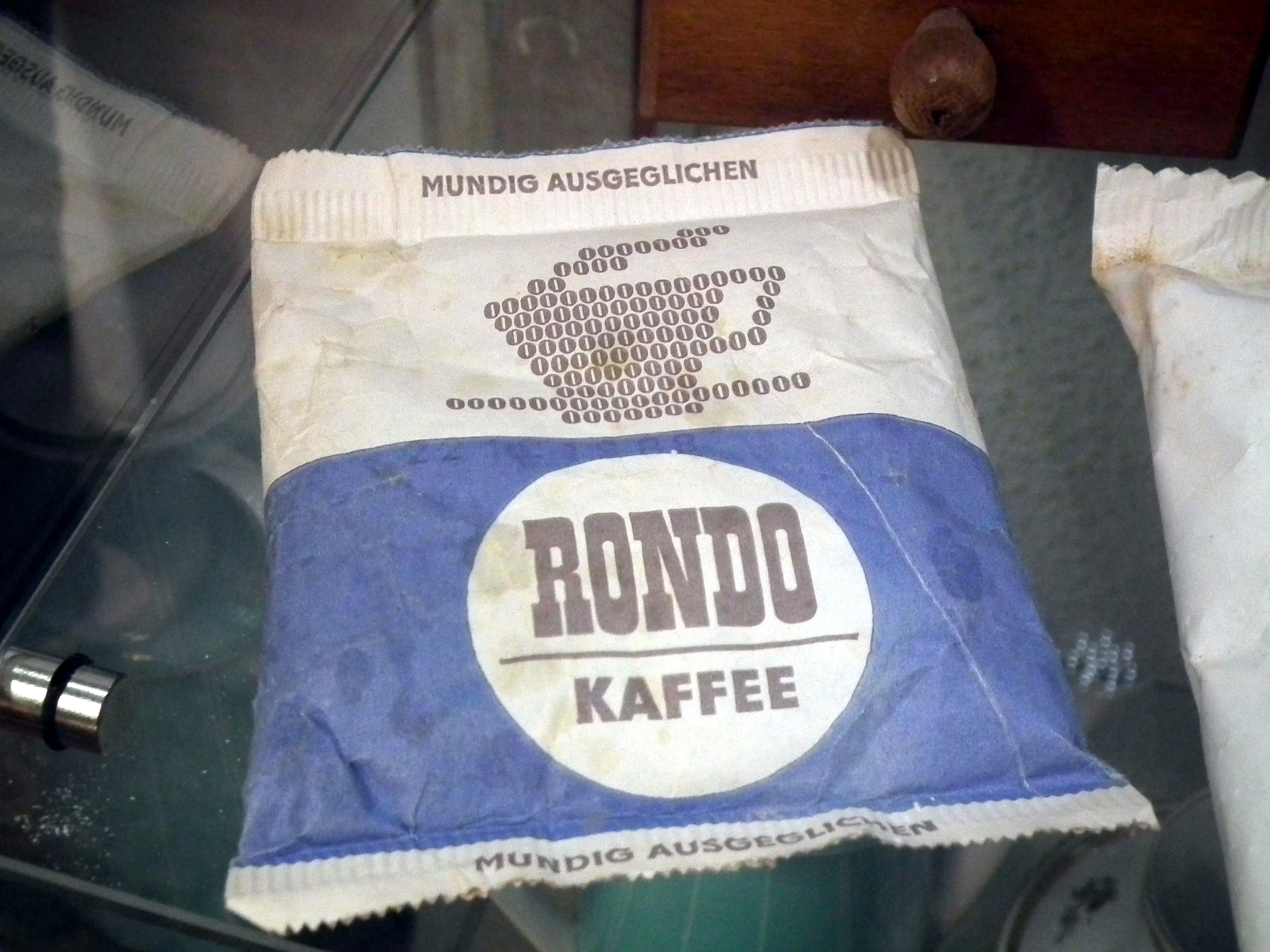 Rondo Kaffeepackung, Veröffentlicht mit Genehmigung der Museumsleitung